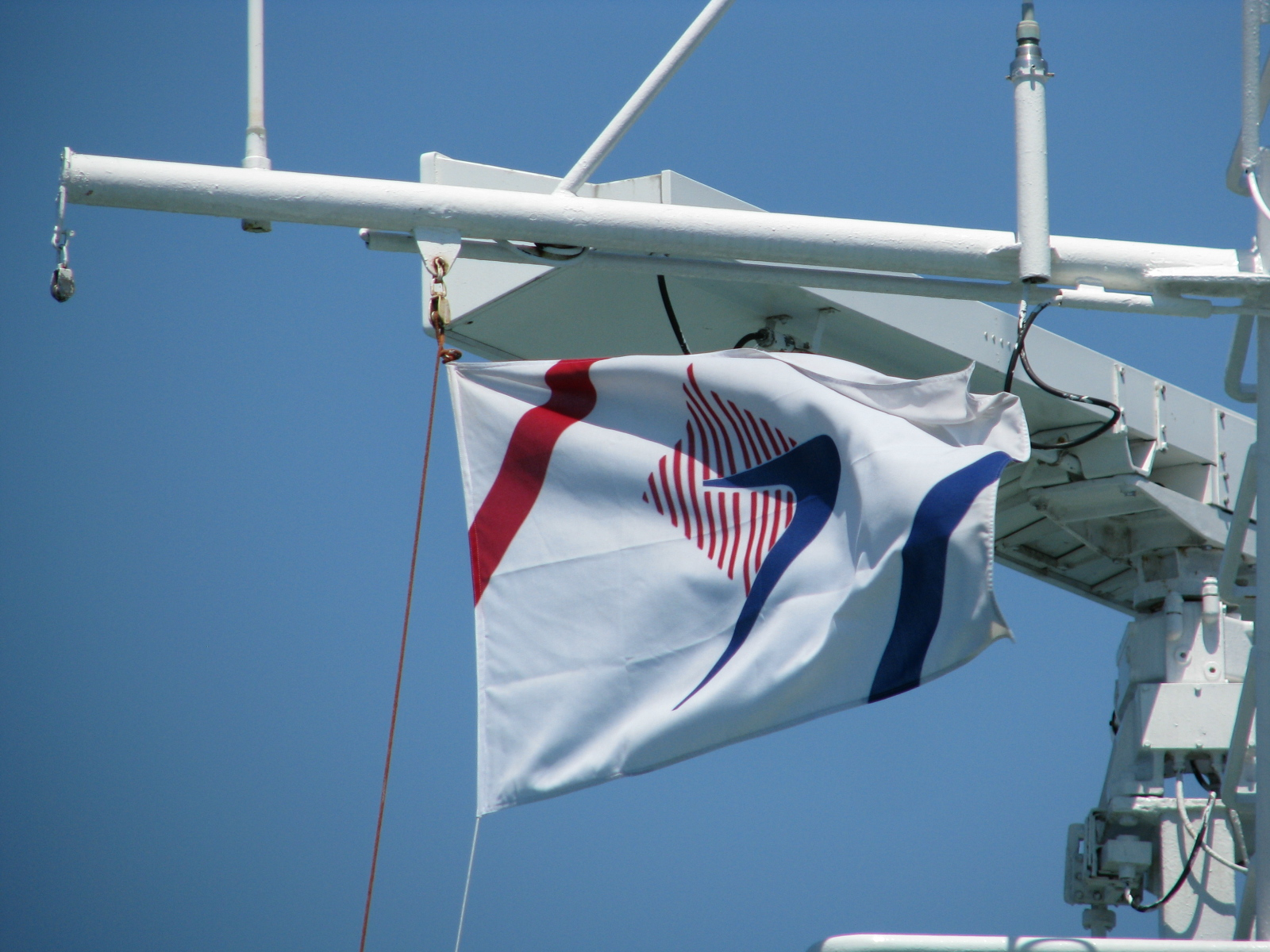 Jadrolinijina brodarska zastava na trajektu Petar Hektorović